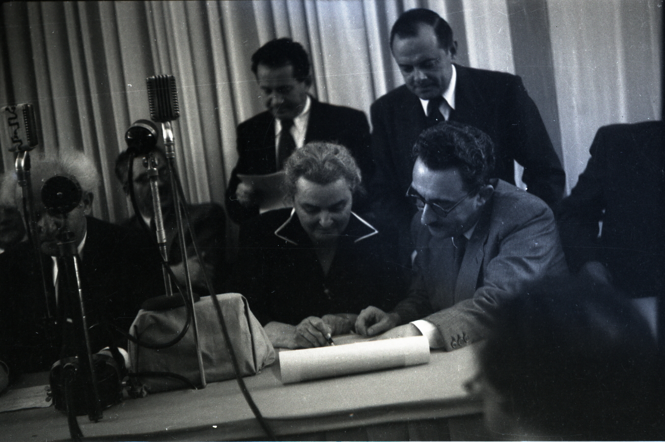 רחל כהן כגן חותמת על מגילת העצמאות 1948